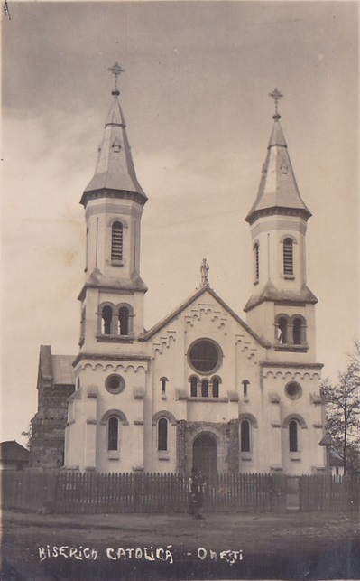 Biserica cu hramul „Sfinții Petru și Paul” din Onești, construită între 1920-1945. În această carte poștală se poate vedea în etapa de construcție.